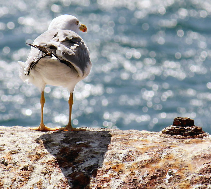 Geelpootmeeuw